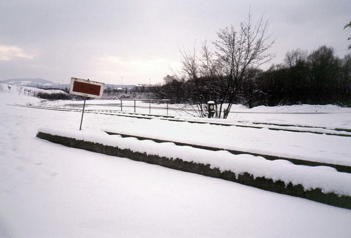 Bayreuth Kreuzstein 1986 mit Glasenweiher (Scan von Dia)